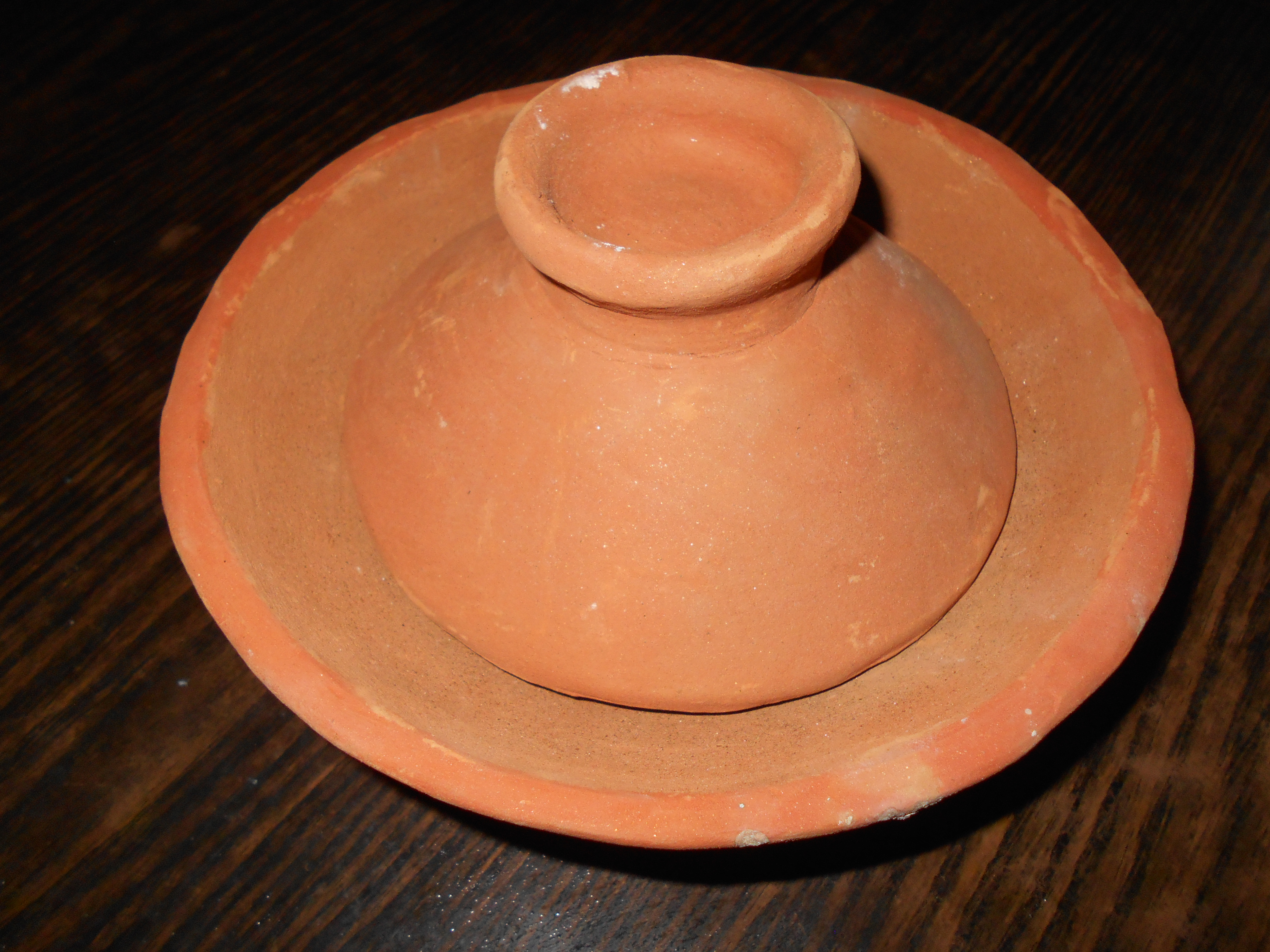 পিঠে করার সরা